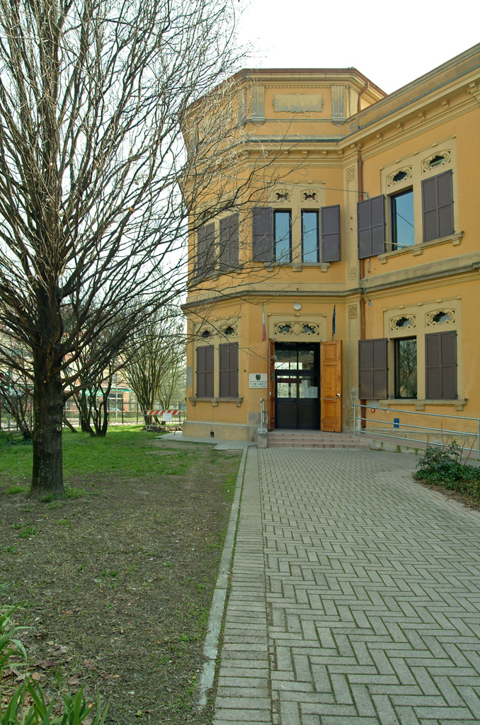 Scuola Elemantare Edmondo De Amicis Licensing Fotografo: Vincenzo Tuccio